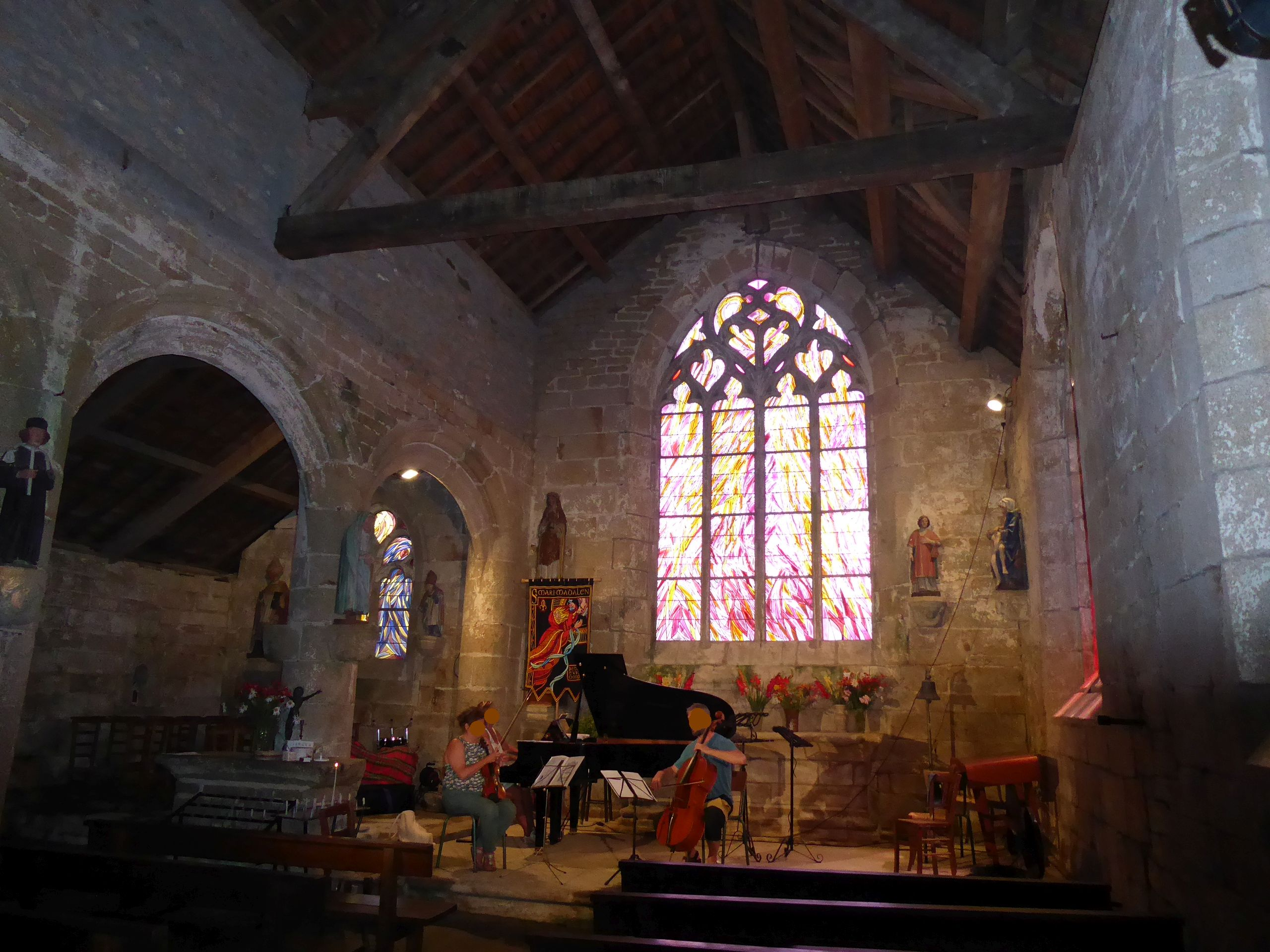 Chapelle Sainte-Marie-Madeleine de Penmarc'h